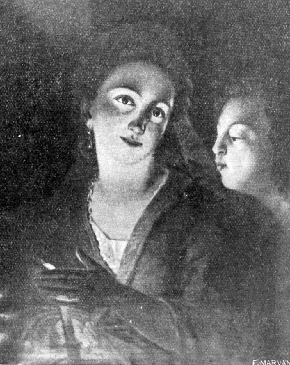 Efect de lumina, inspiratie dupa Gerard Dou, Colectia doctor C. Moga, Brasov. Foto alb/negru.